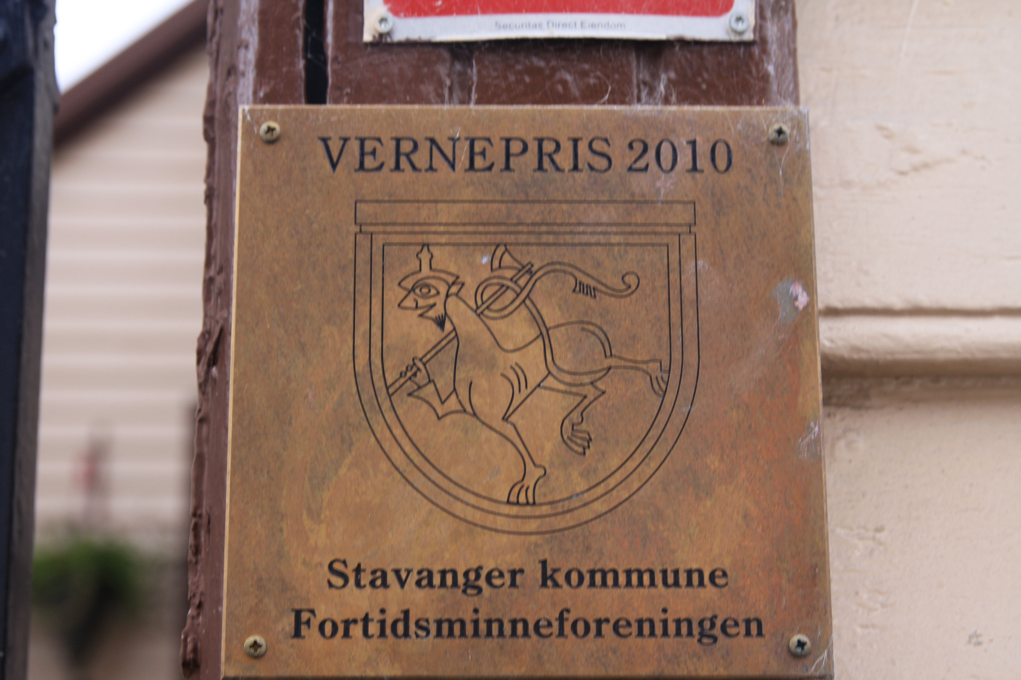 Øvre Strandgate 60 Vernepris (2)